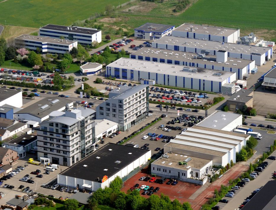 Hauptsitz der FEV Motorentechnik GmbH